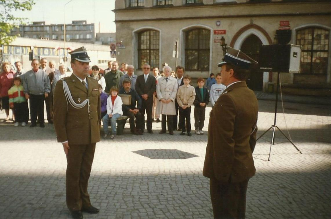 Dowódca garnizonu mjr Kazimierz Adamski